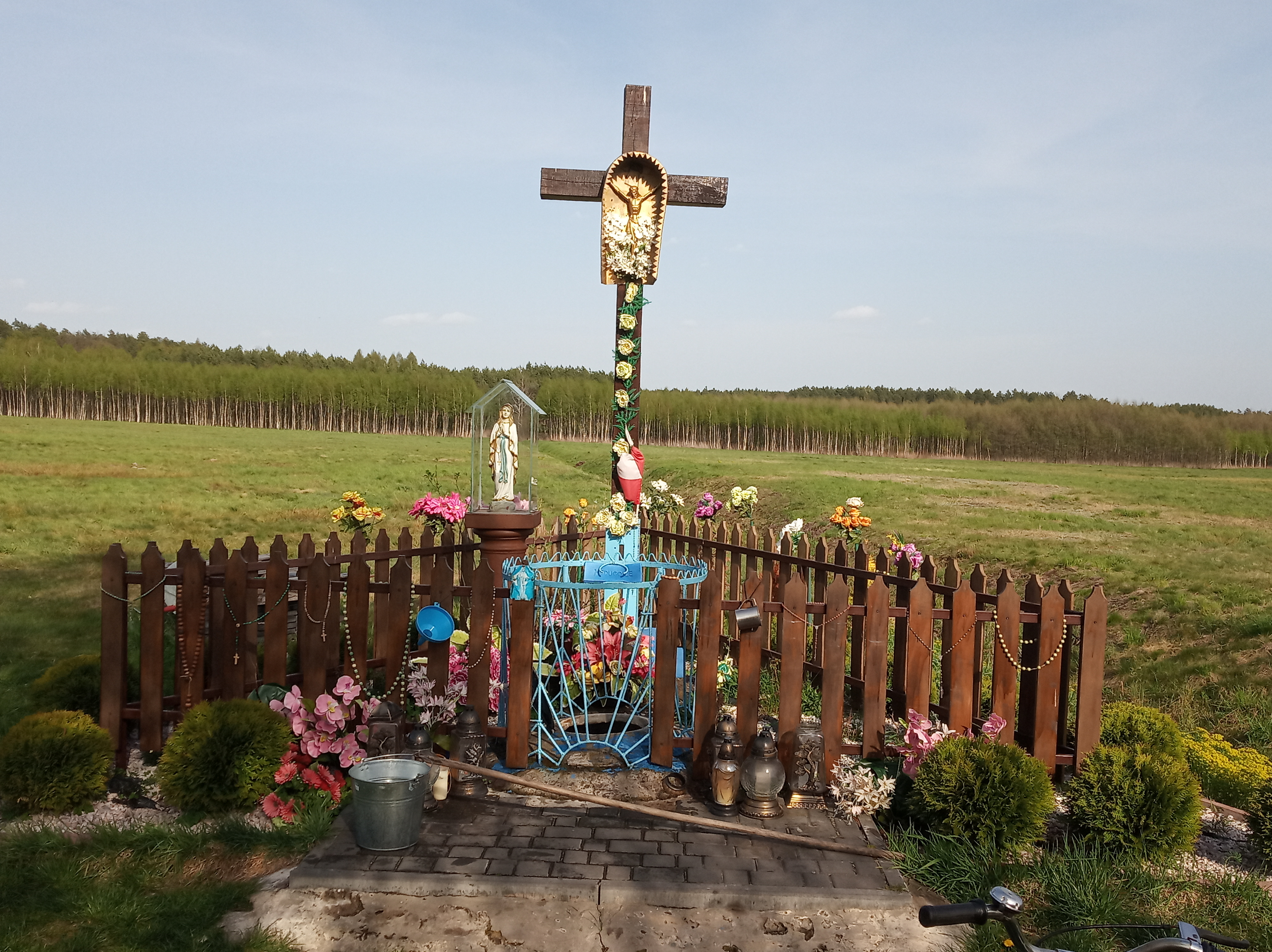 Studzienka ,, cudowne źródełko""